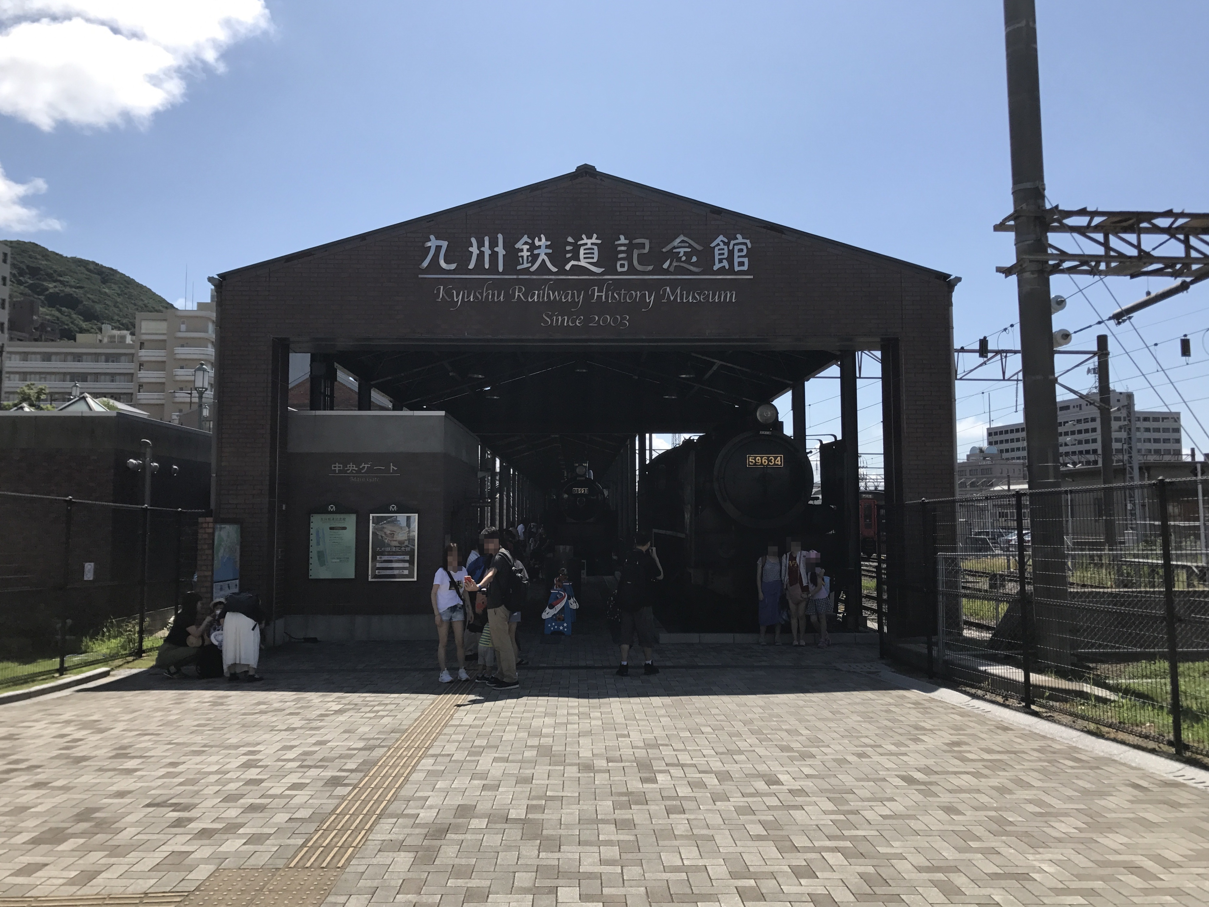 九州鉄道記念館